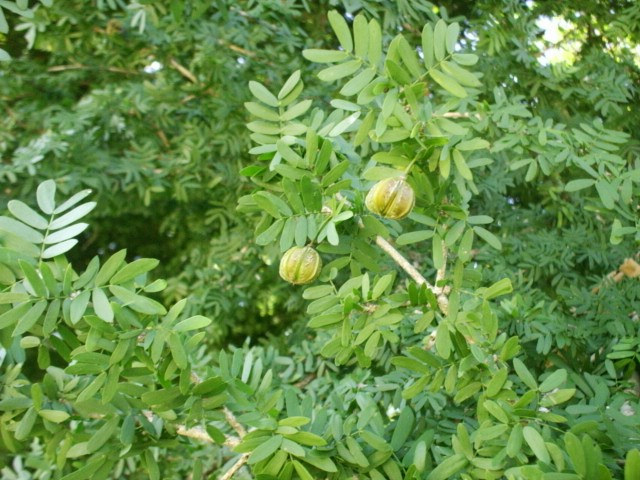 Guayacum coulteri